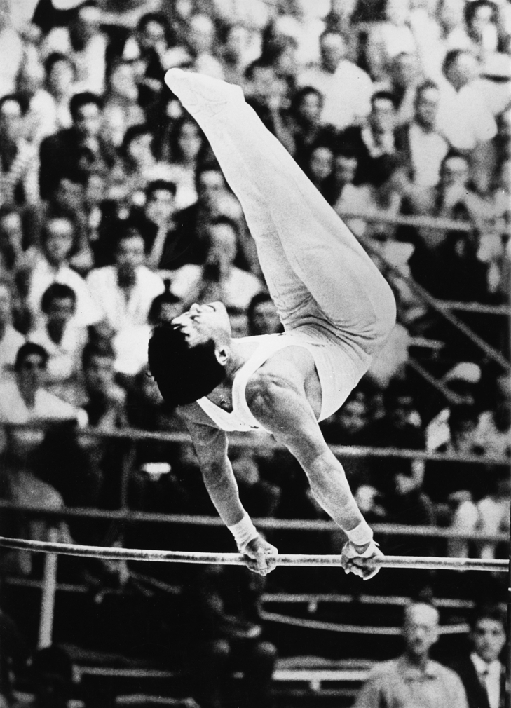 Takashi Ono, 1960 Olympics